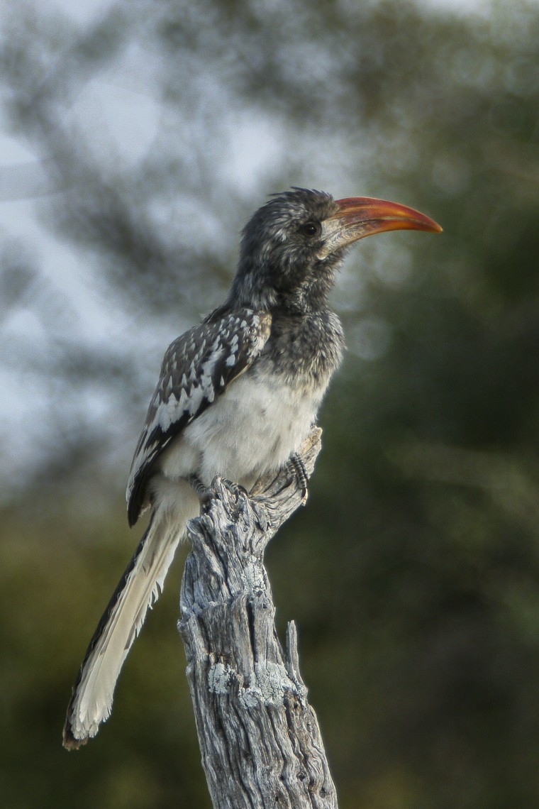 Monteiro's Hornbill - Namibia_IMG_2370